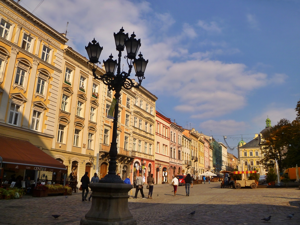 Площа Ринок (північна сторона) 2013